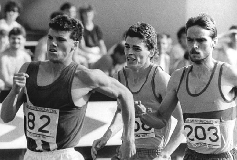 Jens-Peter Herold, Hauke Fuhlbrügge, Andreas Kaliebe ADN-ZB Koard 24.8.87-A-Potsdam: 38. DDR-Leichtathletik-Meisterschaften - Jens-Peter Herold (ASK Vorwärts Potsdam; M.) gewann am 22.8. den 800-m-Lauf in einer Zeit von 1:46,44 Minuten. Am 20.8. hatte er bereits den Titel im 1 500-m-Lauf in DDR-Rekordzeit errungen. L.: Hauke Fuhlbrügge (SC Turbine Erfurt), Dritter des 800-m-Laufes; r.: Andreas Kaliebe (SC Neubrandenburg), Vierter.